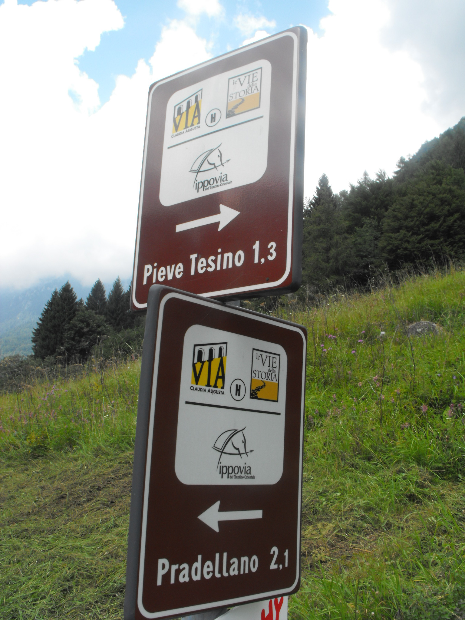 Ippovia del Trentino Orientale presso il Passo della Forcella, Trentino-Alto Adige